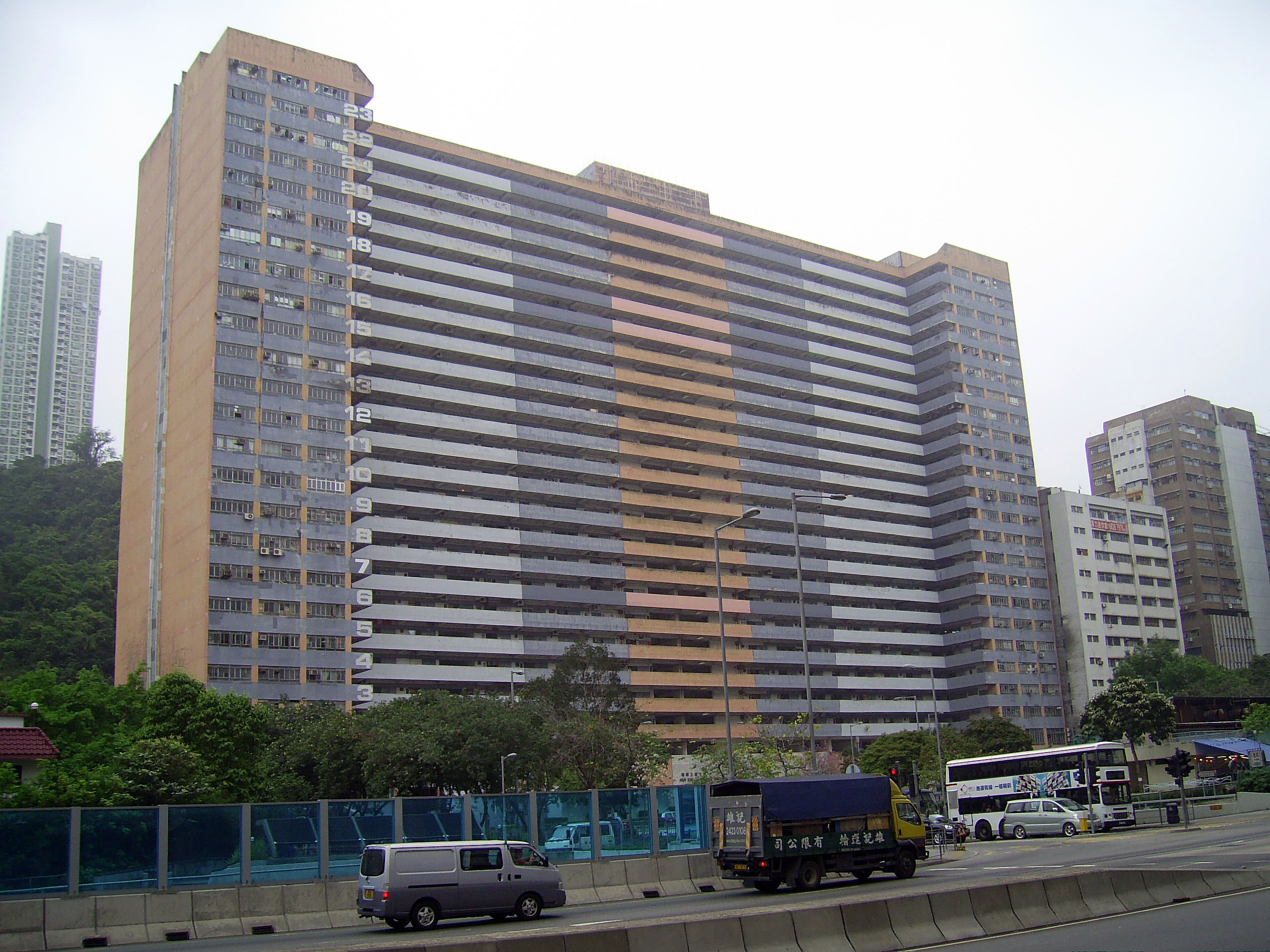 中文（香港）: 沙田火炭穗輝工廠大廈